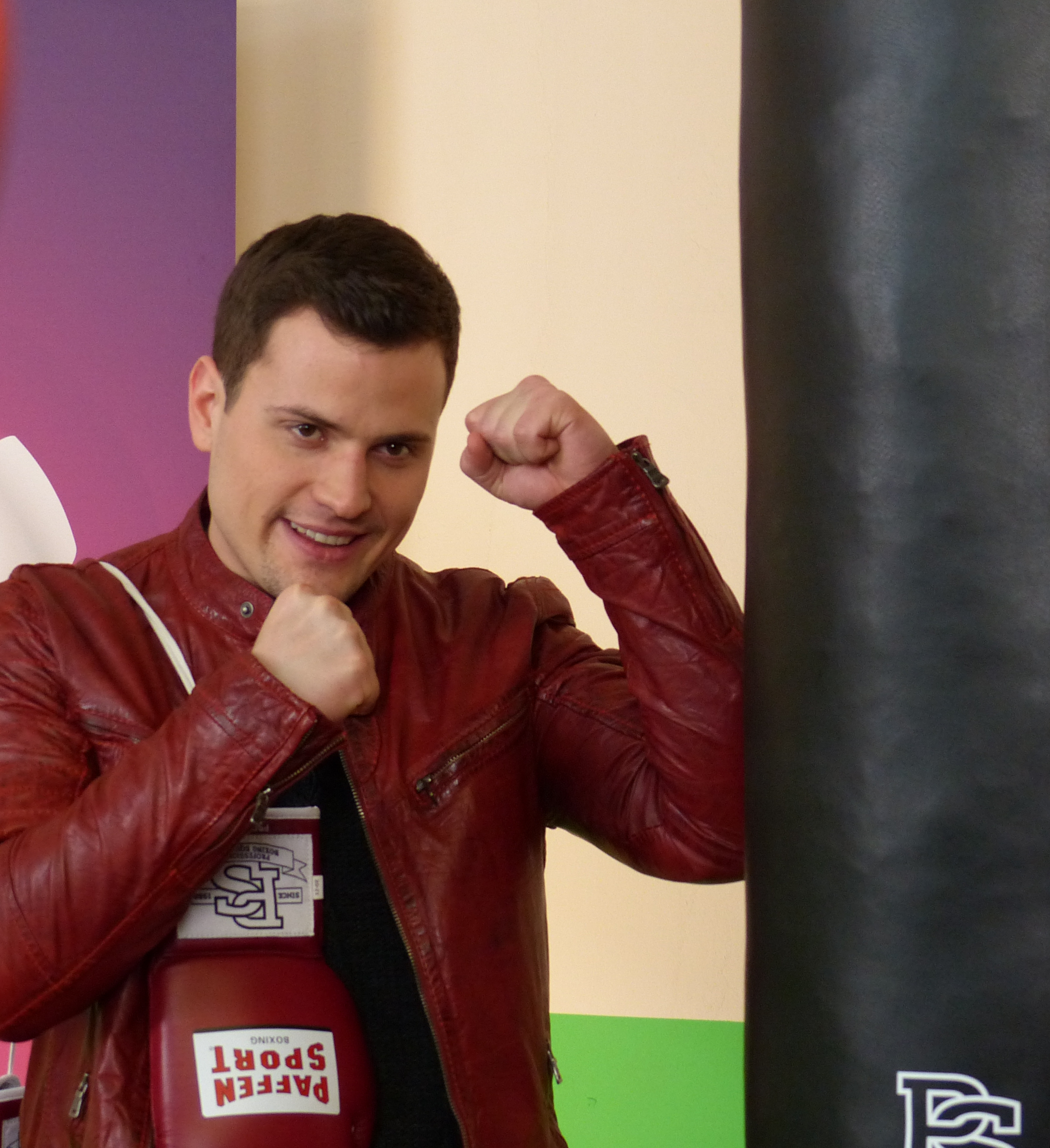 Rocco Stark beim offiziellen Wiegen fürs Promiboxen 2013